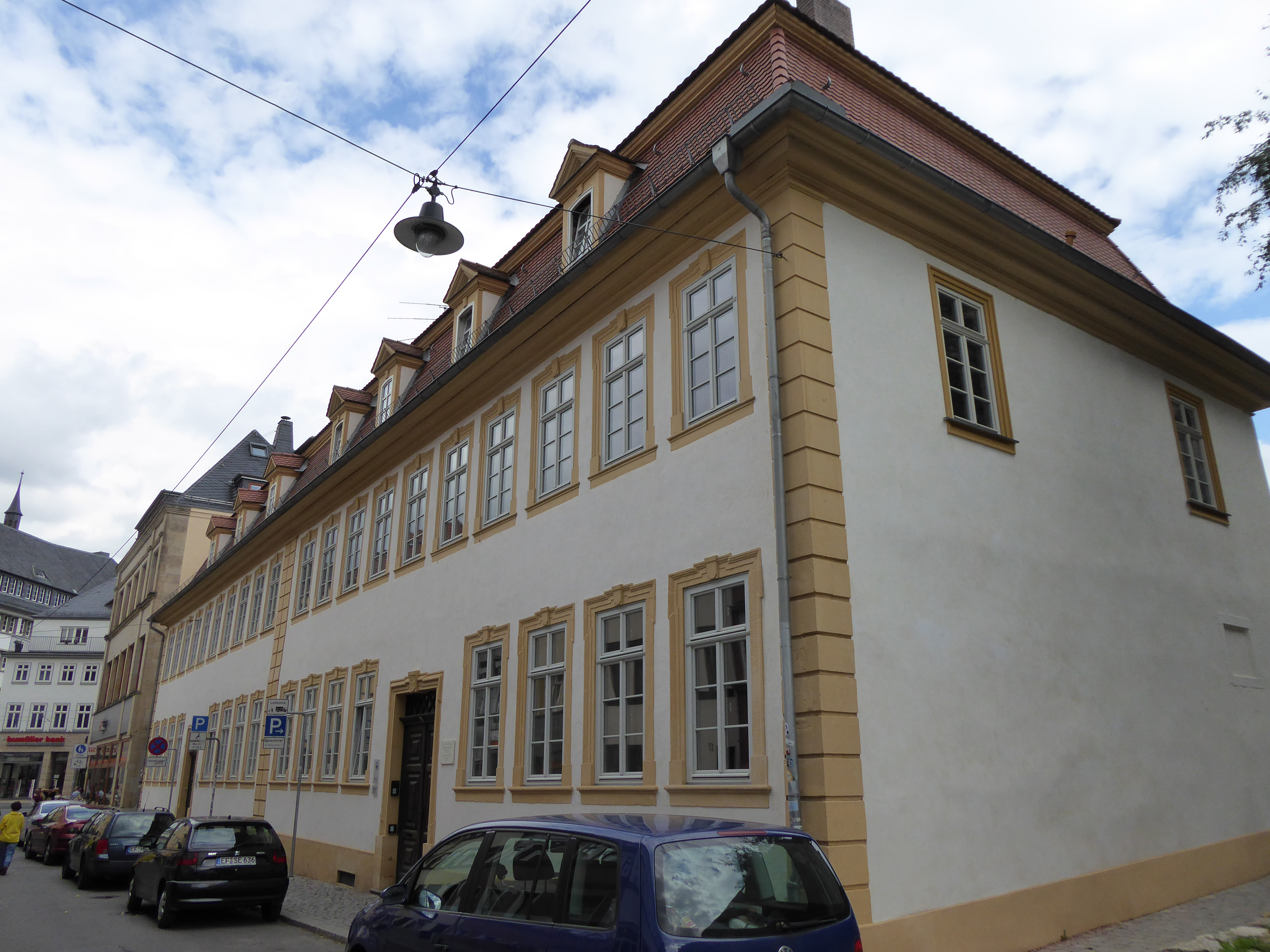 Denkmalgeschütztes Wohnhaus in der Predigerstraße 4 in Erfurt (Doppelgebäude mit Nr. 3)